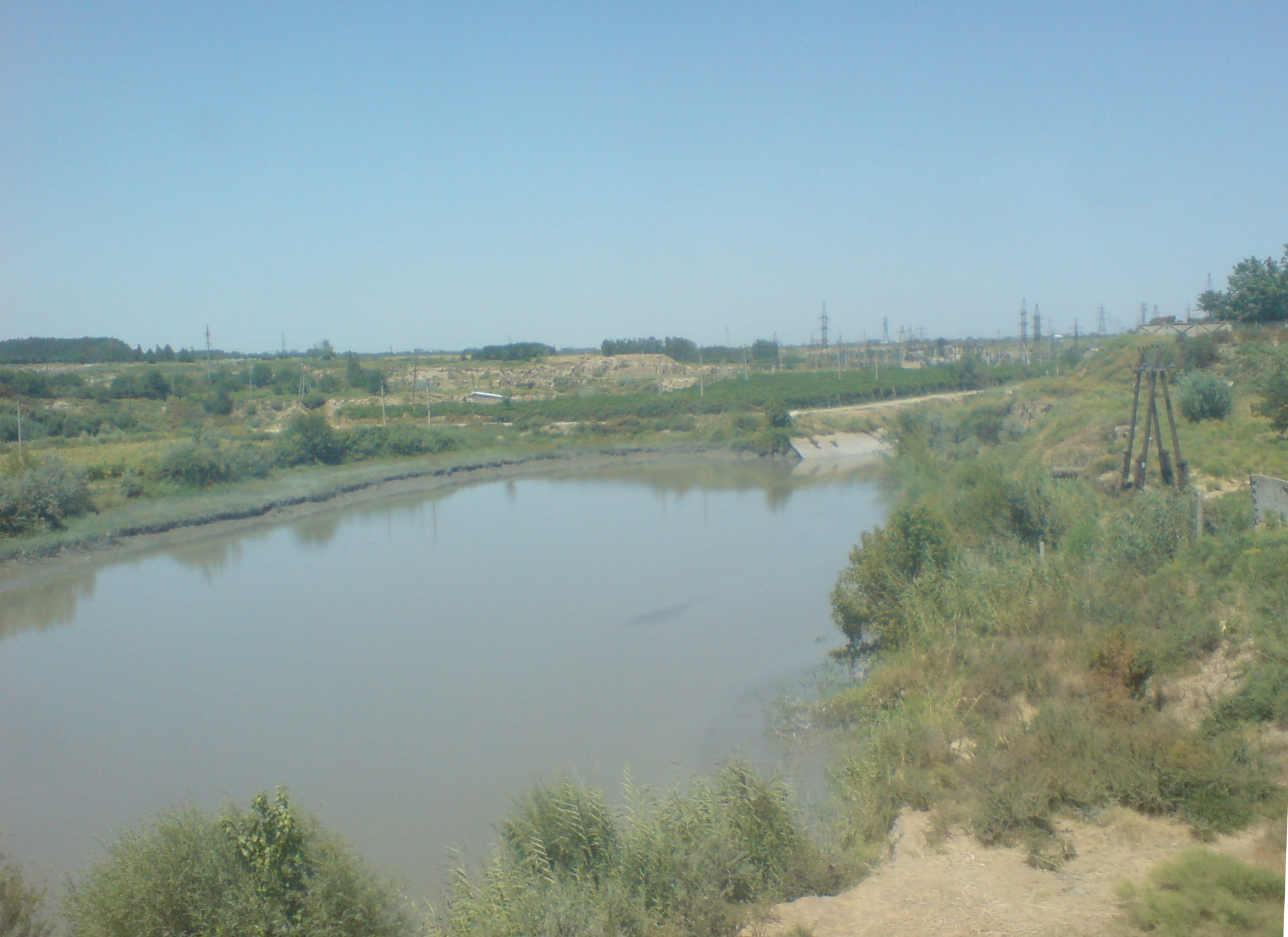 Древний канал Даргом за городом Самарканд (вид с железнодорожного переезда), Узбекистан